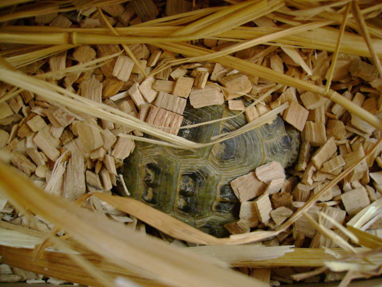 Testudo horsfieldii, letargo controllato, Napoli, Italia.